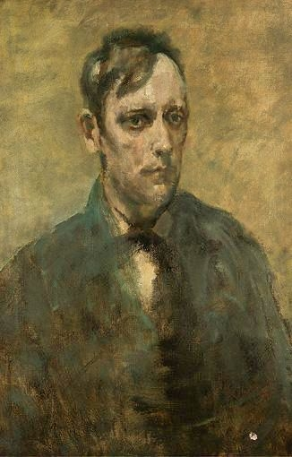 Self-portrait